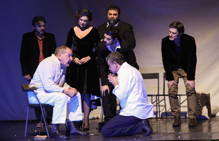 Predstava Hamlet, Jugoslovensko dramsko pozoriste (2016) Glumci : Boris Milivojević, Jasna Đuričić, Miloš Samolov, Nikola Rakočević, Goran Šušljik, dole Vlasta Velisavljević i Nebojša Glogovac